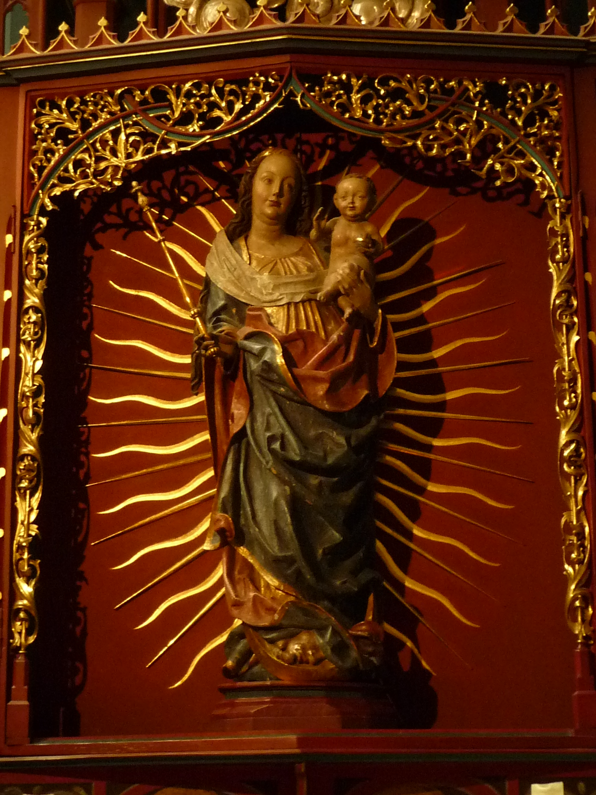 katholische Kirche St. Aposteln in Viernheim, im Kreis Bergstraße (Hessen)